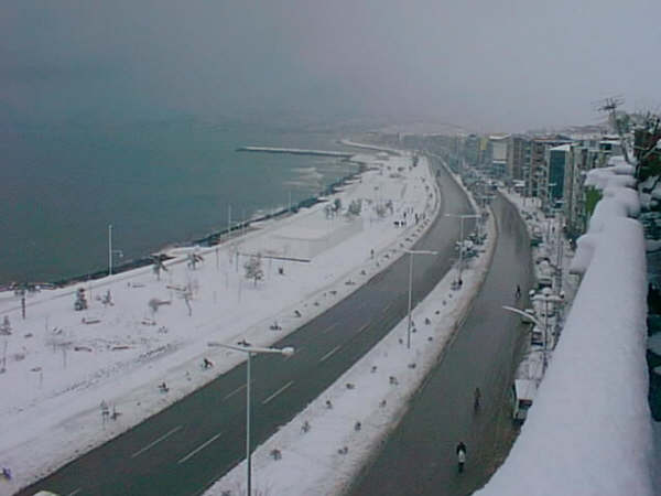 Fatsa, Turkey